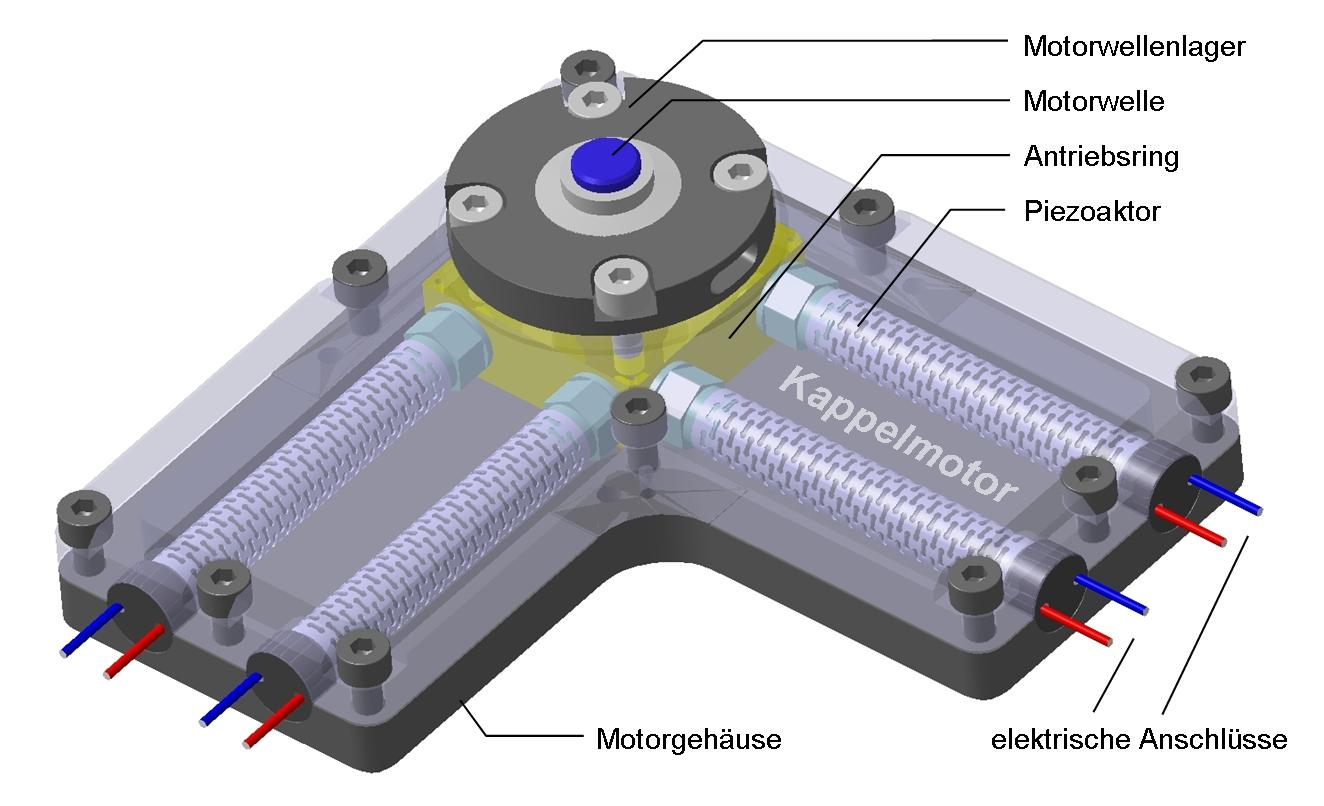 Aufbau eines Kappelmotors. Schlagwörter: PAD-Motor, Kappelmotor, Mikromotor, Elektromotor, Synchronmotor